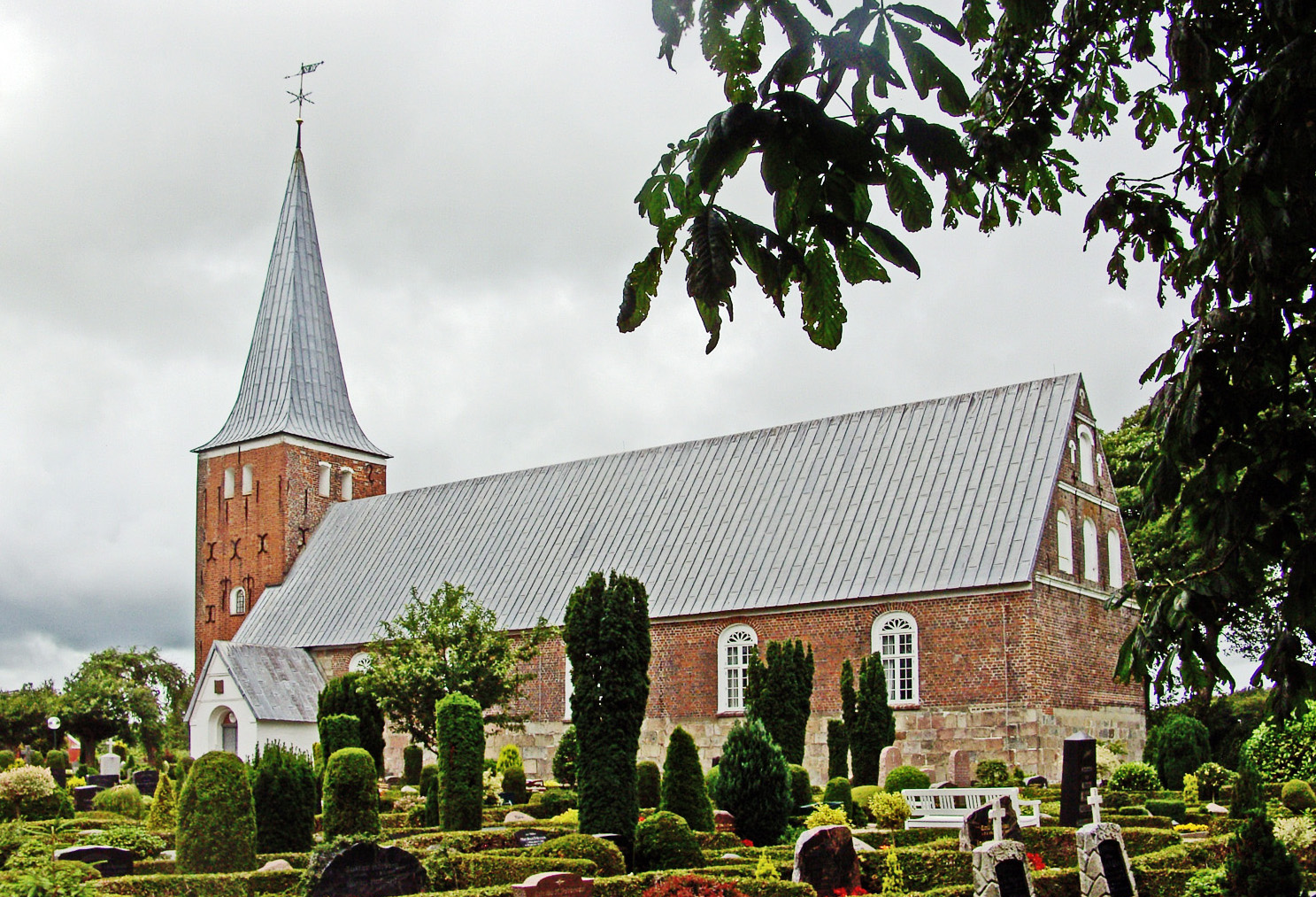 fra sydøst